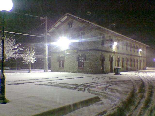 Estación de Sahagún.